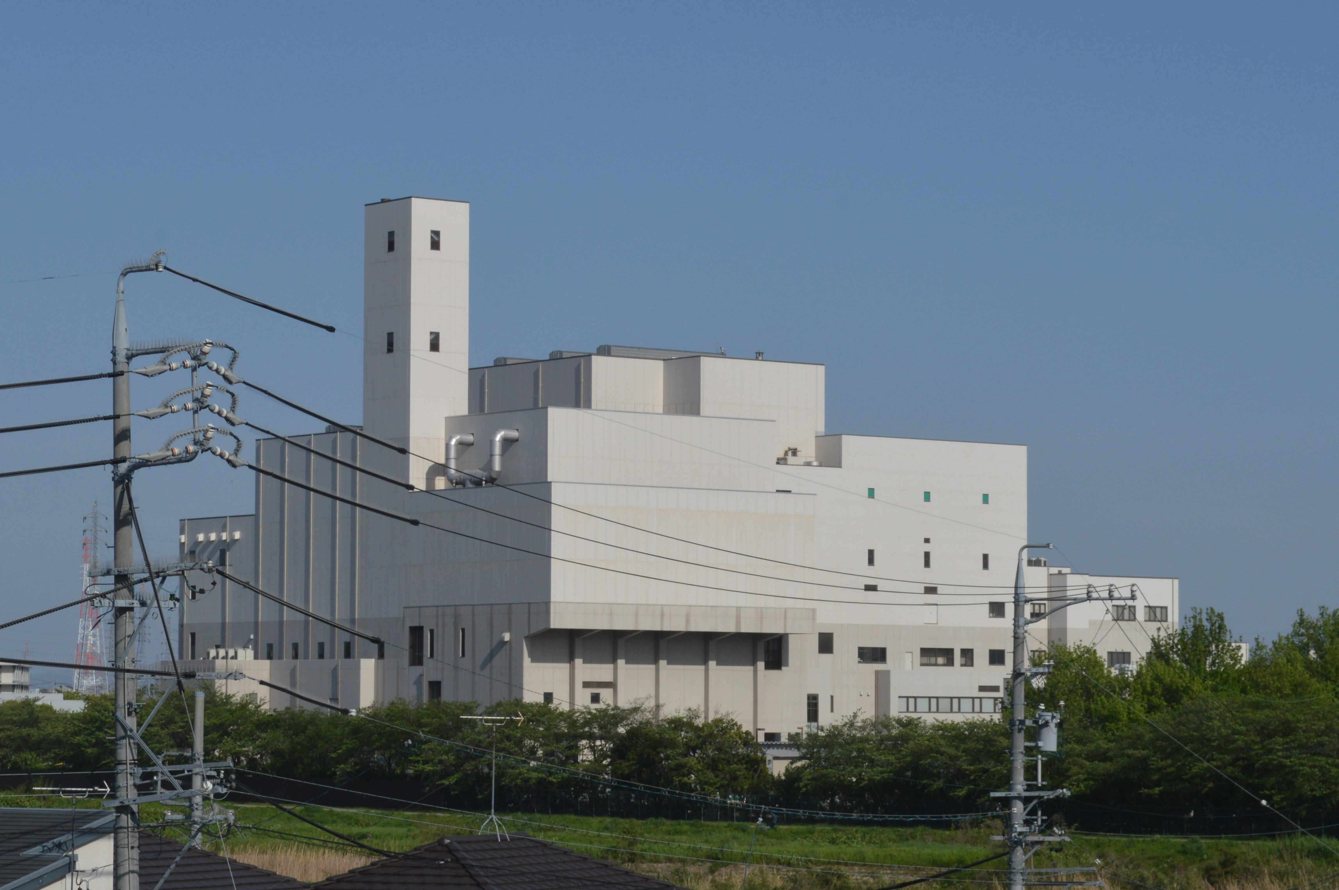 愛知県刈谷市にある刈谷知立環境組合クリーンセンター。